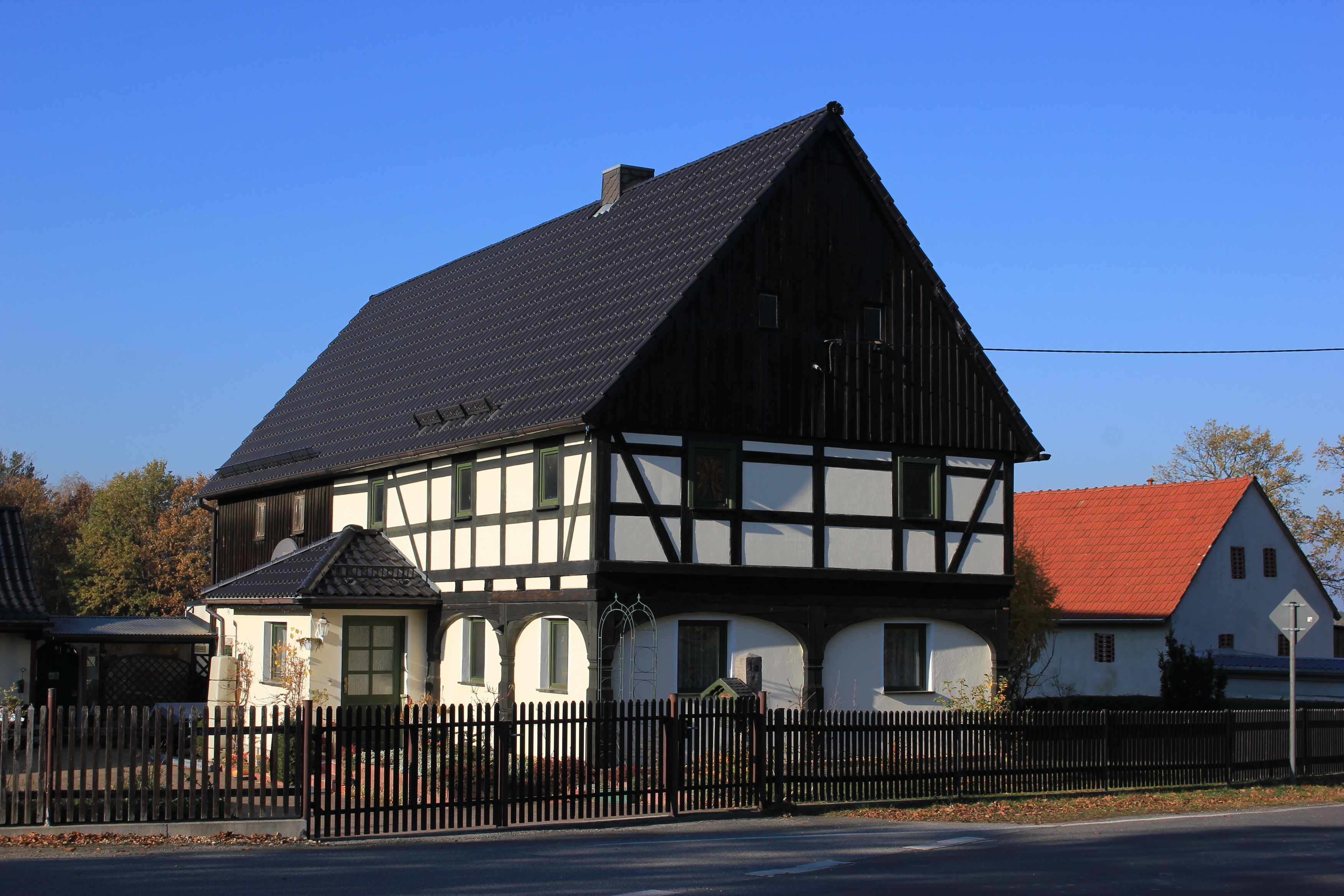 Hornjoserbsce: Chěžka ze stołom při Zdźěrjanskej w Brěmjenju (kulturny pomnik).